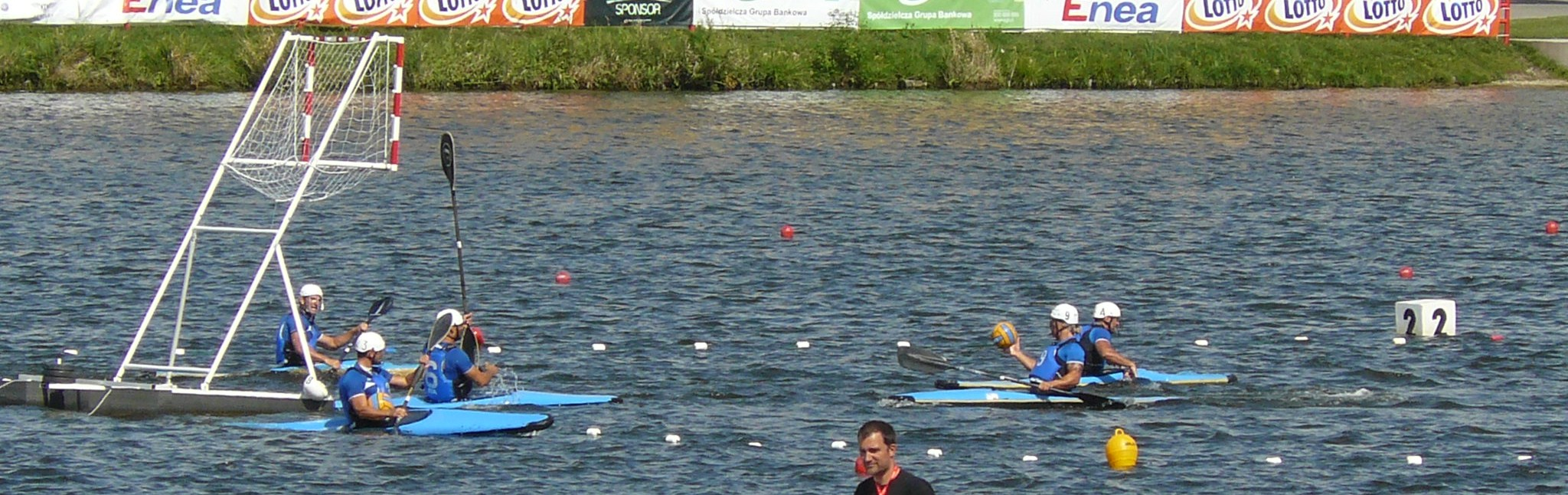 Mistrzostwa Europy w Kajak-polo, Poznań, sierpień 2013r. Jez. Maltańskie.